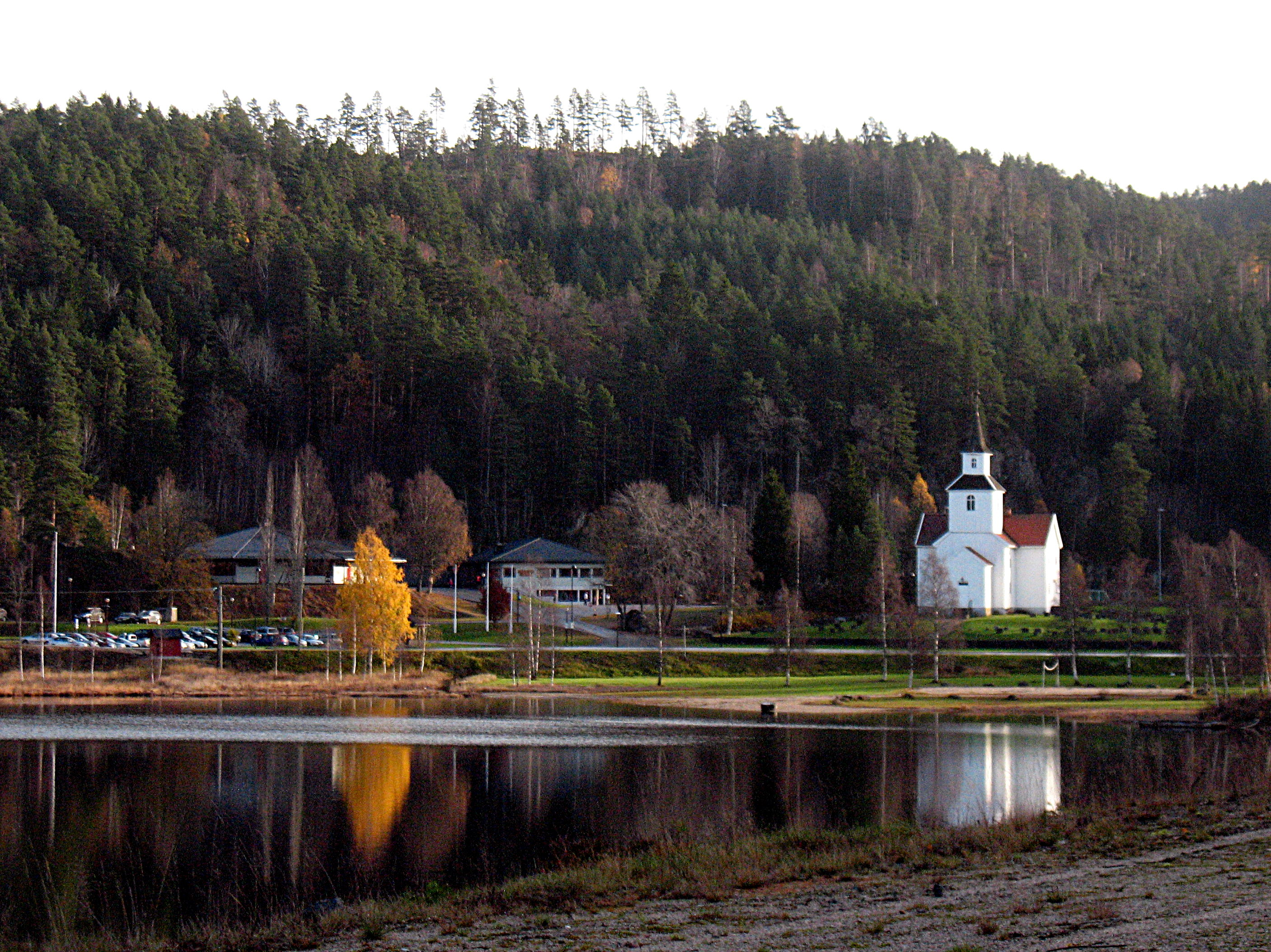 Grenda Iveland ved Birketveitstjønna med kyrkja og skulen. Svintoksknutten i bakgrunnen.